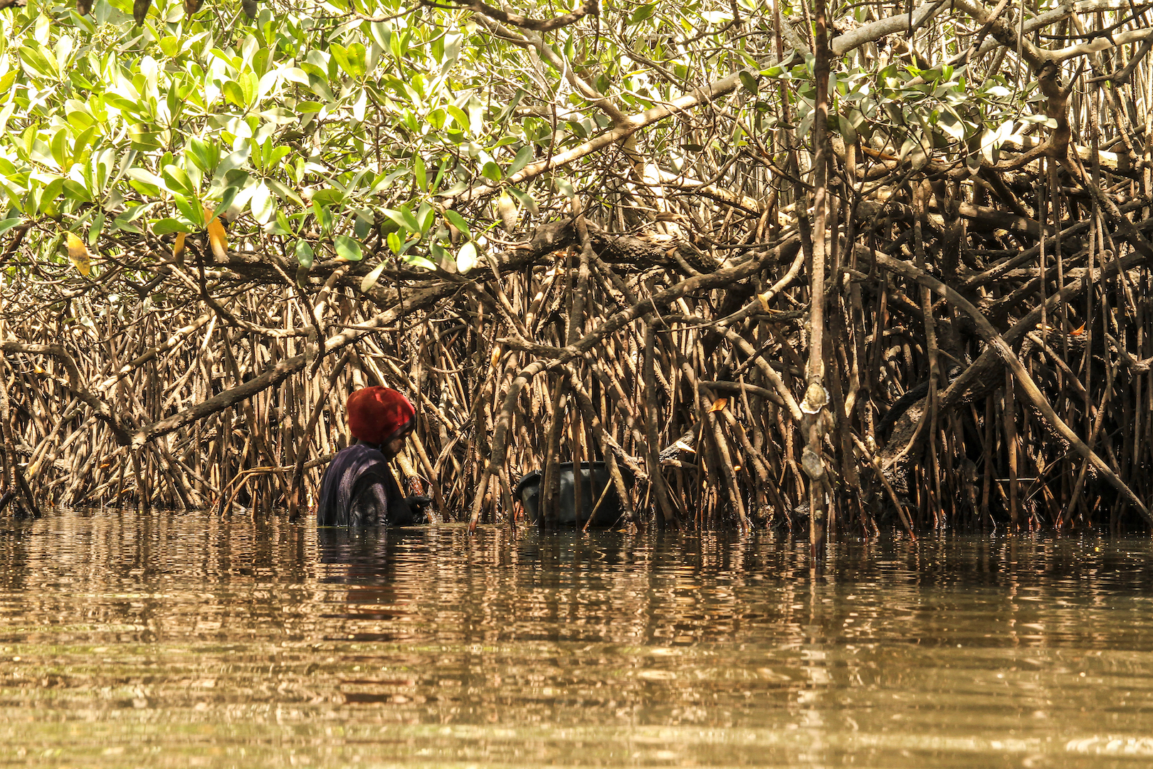 Cueilleuse traditionnelle d'Huîtres de mangrove, delta du Sine Saloum, femme du village de Soucouta, Sénégal This is an image of "African people at work" from Senegal